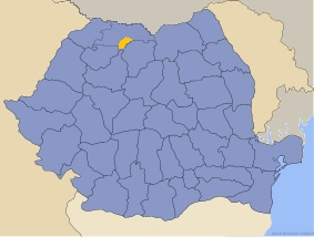 Tara Lapusului in geografia Romaniei